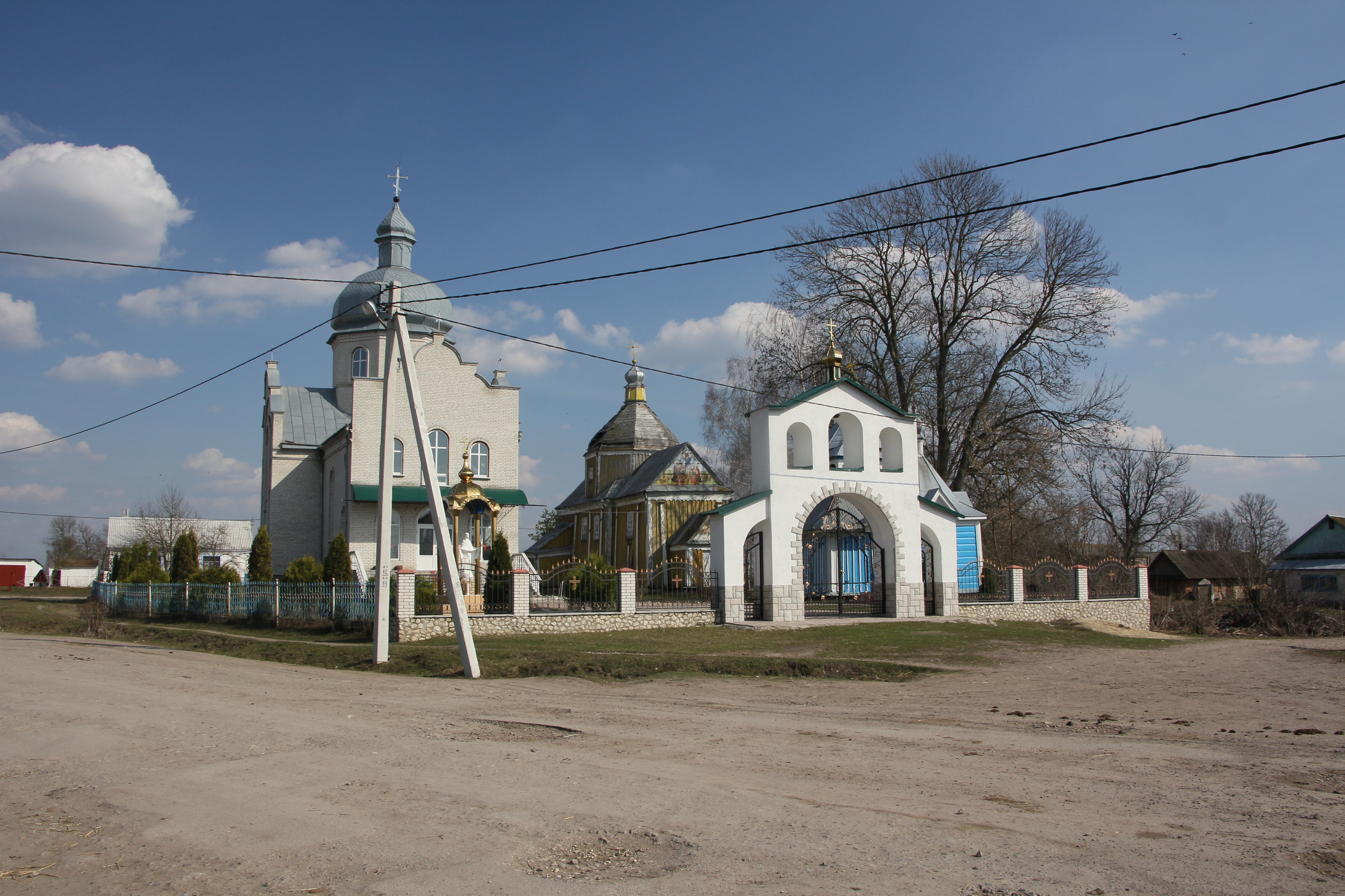 Стара дерев'яна поруч нової мурованої церкви в селі Юськівці Лановецького району, Тернопільської області